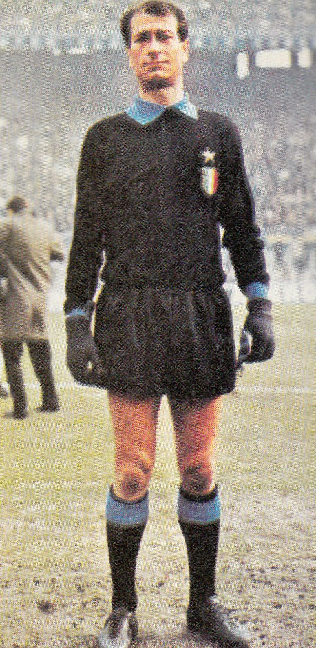 Il portiere di calcio italiano Giuliano Sarti all'Inter nella seconda metà degli anni 60 del XX secolo.